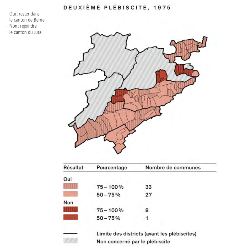 Résultat du deuxième plébiscite du 16 mars 1975.